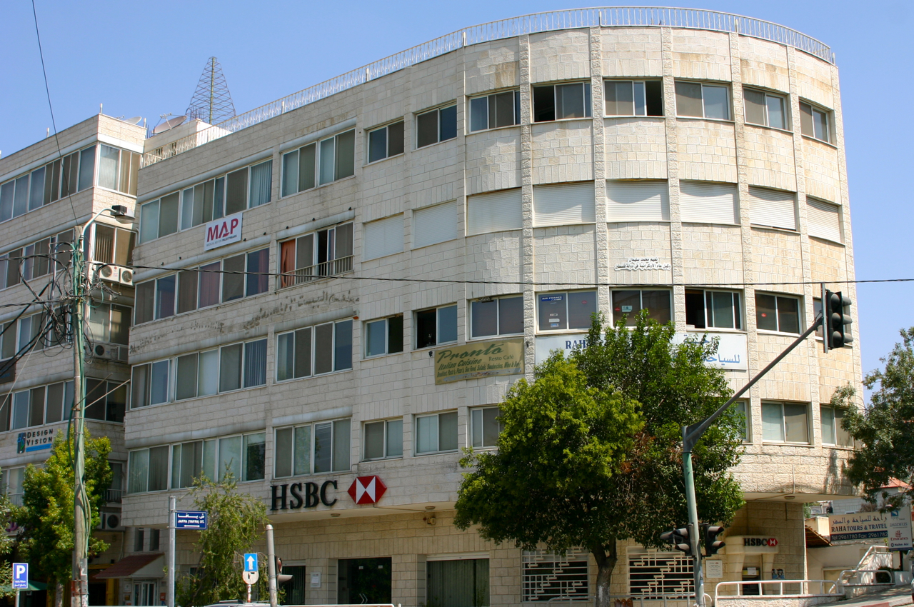 Die HSBC-Bank in Ramallah, Palästina. Object location31° 54′ 06″ N, 35° 12′ 02″ E